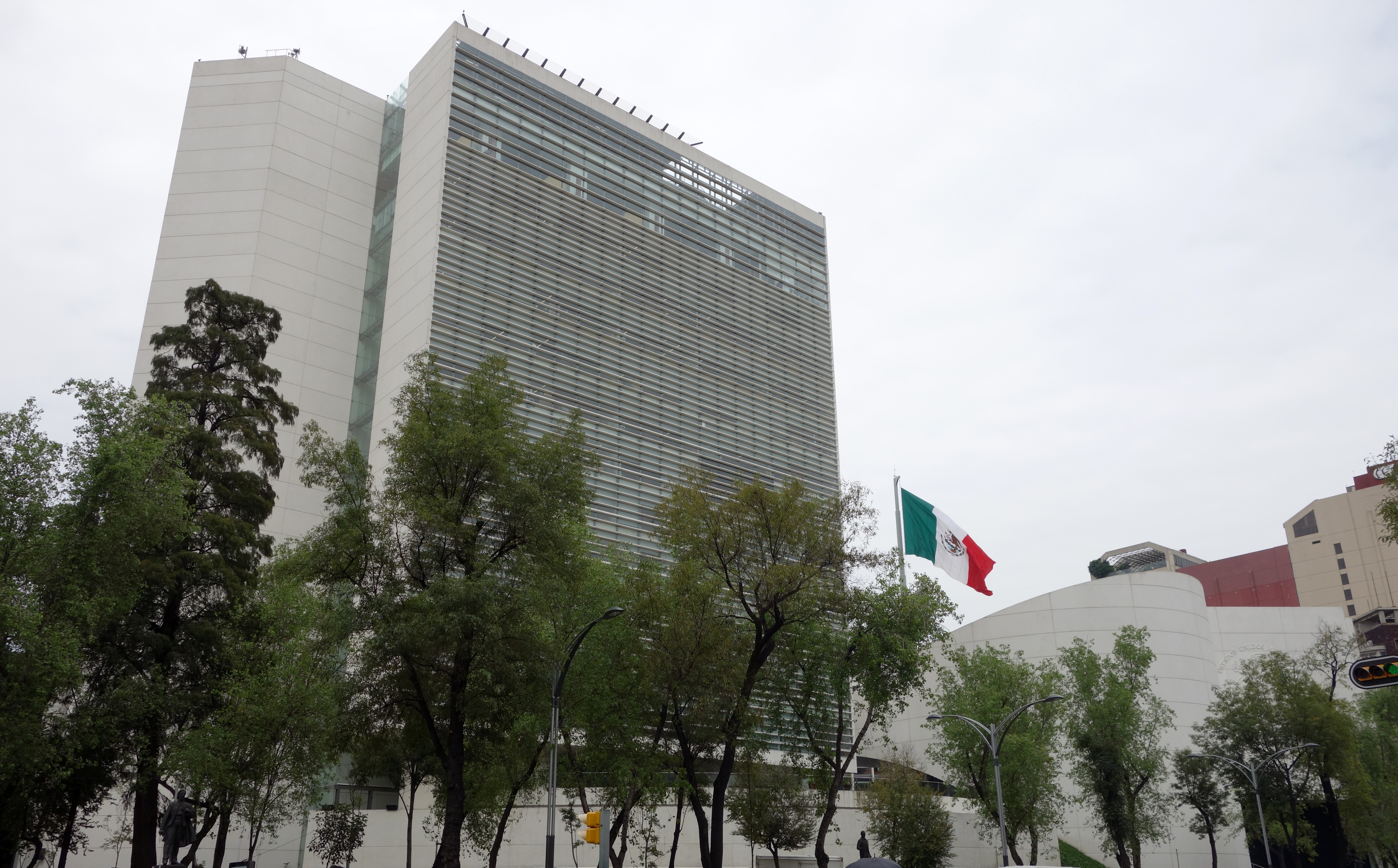 Mexicos senatsbygning i Mexico by